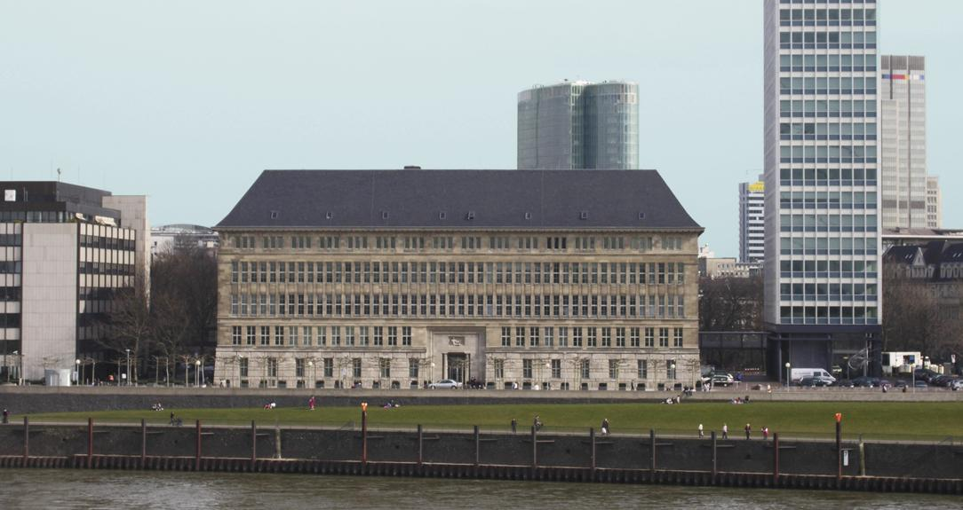 Peter Behrens: Düsseldorf, Fassade Hauptverwaltungsgebäude Mannesmann (heute Vodafone)